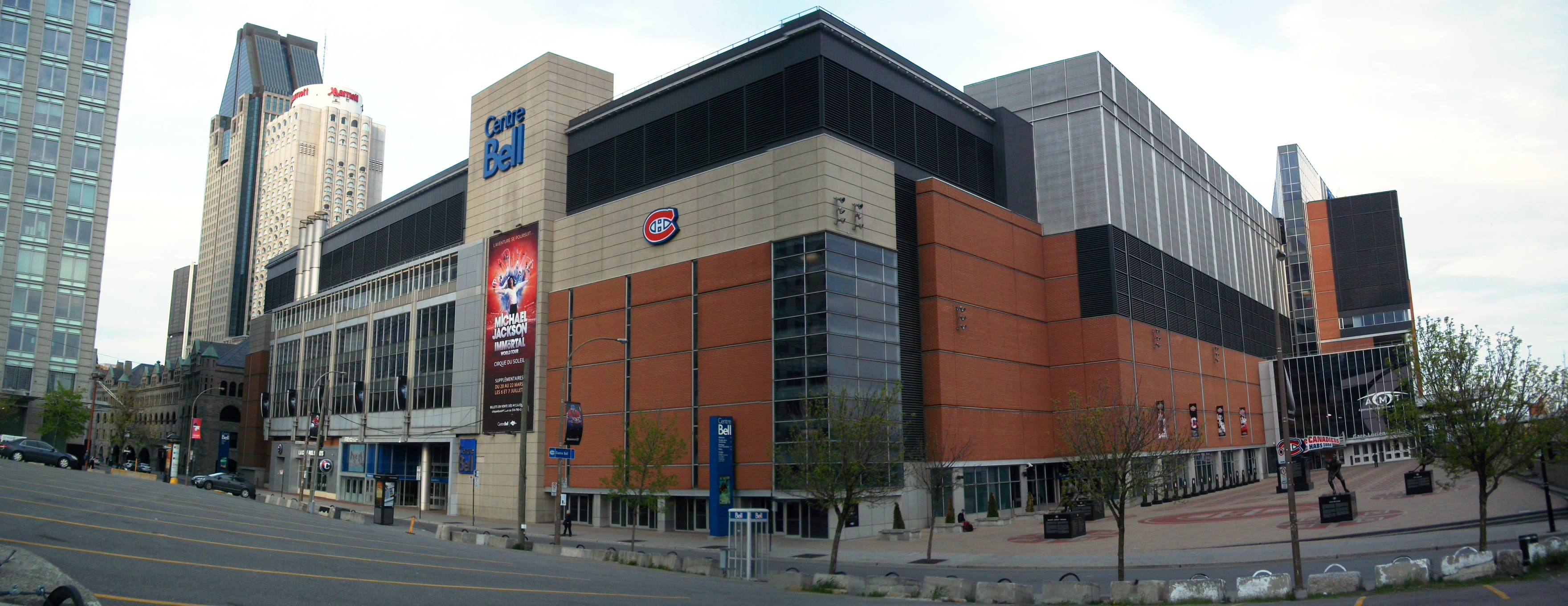 Centre Bell, Montréal